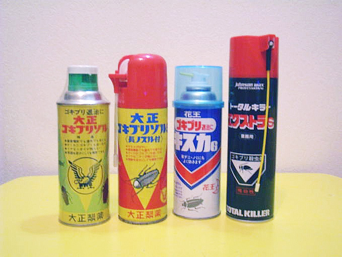 ゴキブリ用エアゾール剤（右から２番目がゴキブリキスカ）. ゴキブリ用エアゾール剤（左から1番目が、大正ゴキブリゾル、左から2番目が大正ゴキブリゾルS）. ゴキブリ用エアゾール剤.